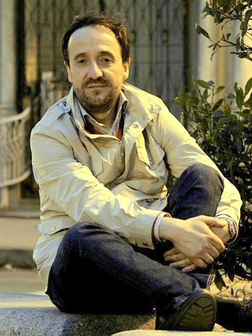 El periodista Carlos Fonseca publica Tipos Infames (Temas de Hoy) sobre los grupos que han salido ganando con la crisis. "Aquellos que exigen sacrificios, no se los aplican a sí mismos", afirma. "Me gustaría que el PSOE contestase si va a retirar la reforma laboral del PP si gana las elecciones y por qué no retira también la suya", espeta el autor